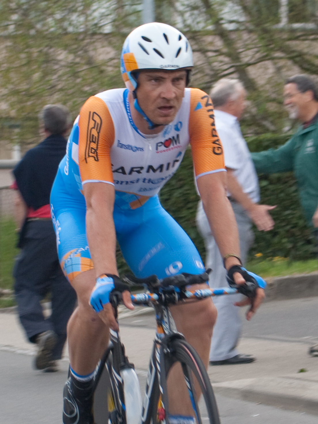 Robert Hunter, troisième étape du Tour de Romandie 2010.